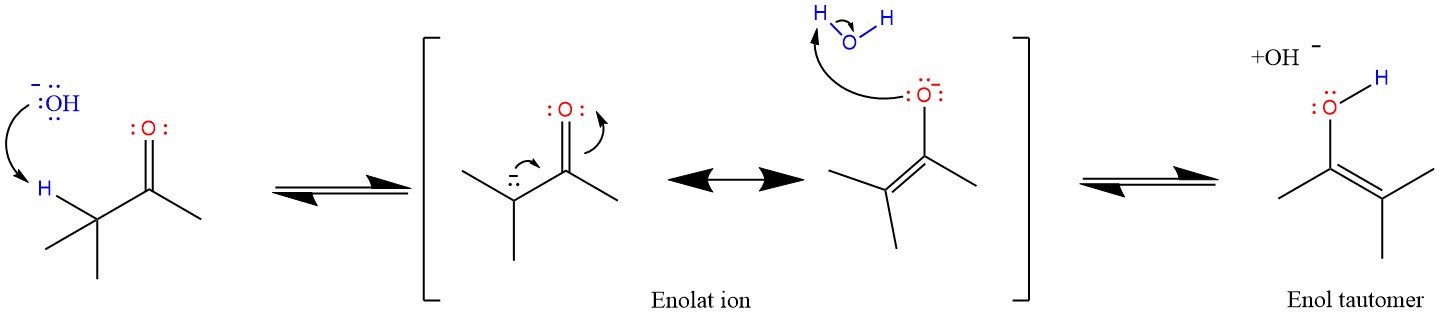 Basekatalysert keto-enol tautomerisering